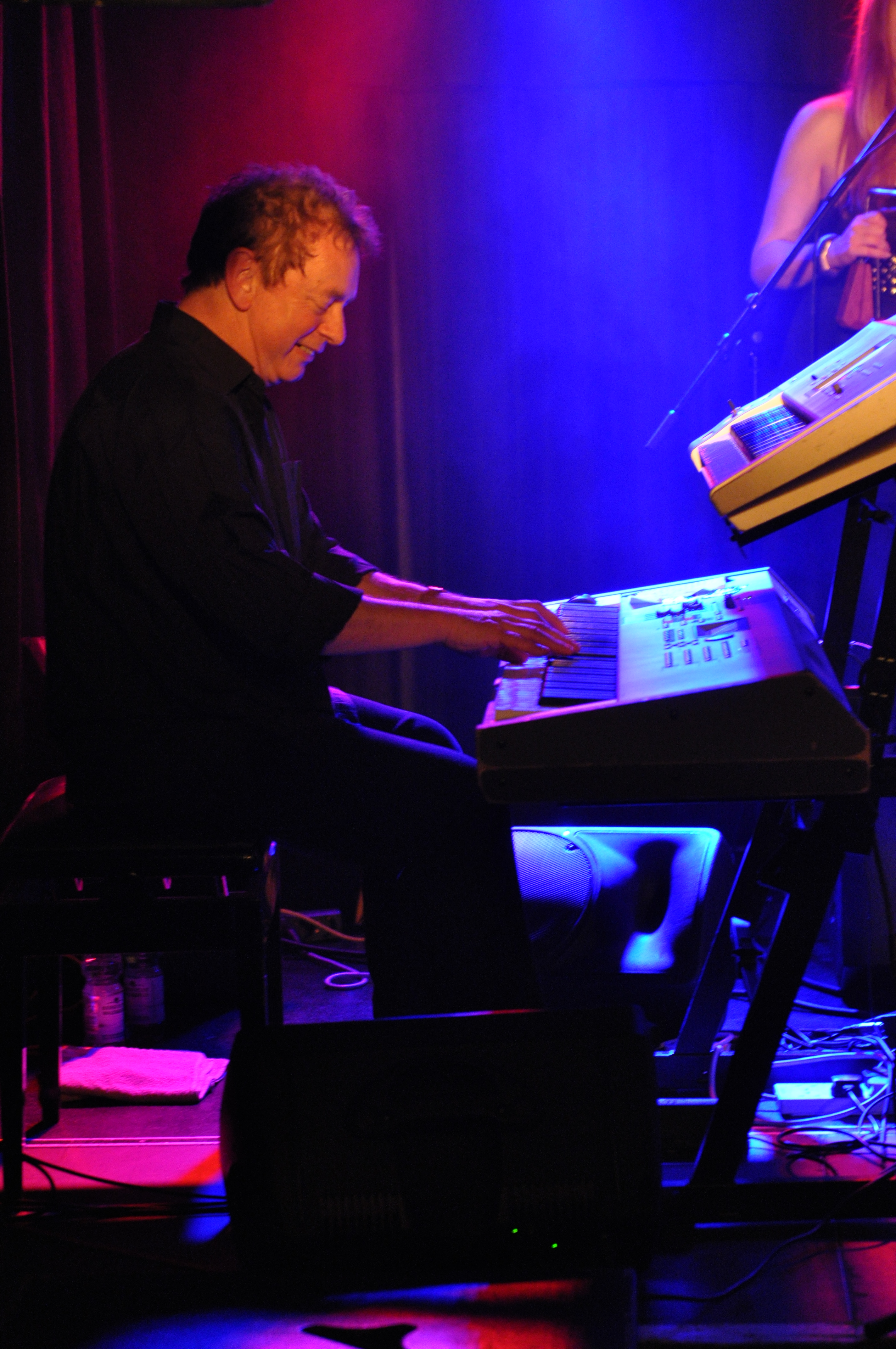 Shakatak am 19. September 2014 im Live Club Barmen in Wuppertal